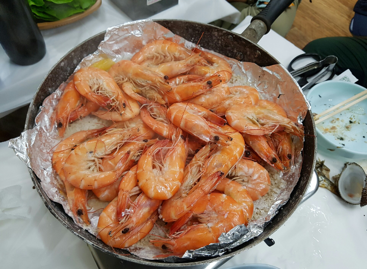 소금 새우구이